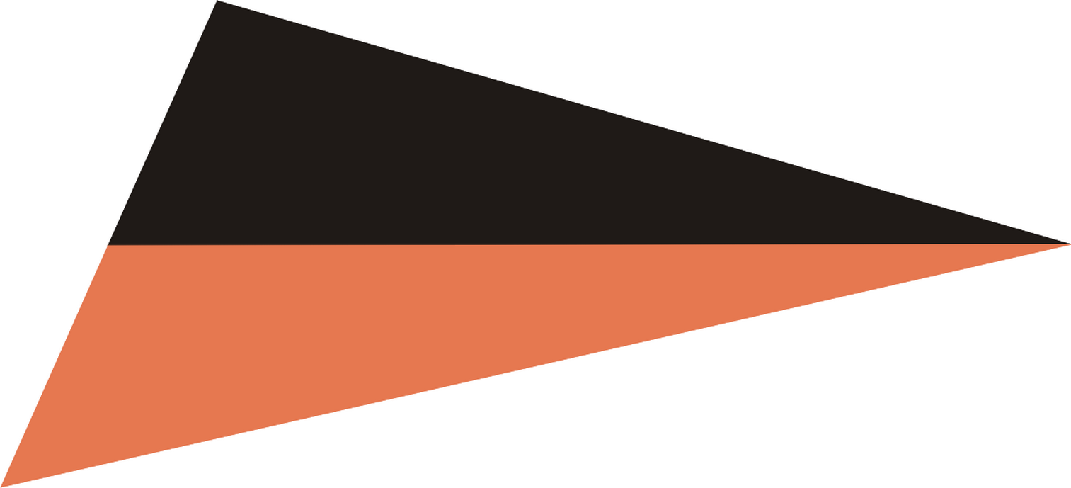 LWP - barwy broni na kołnierze kurtek obowiązujące od stycznia 1945 - kadra pancerna i samochodowa